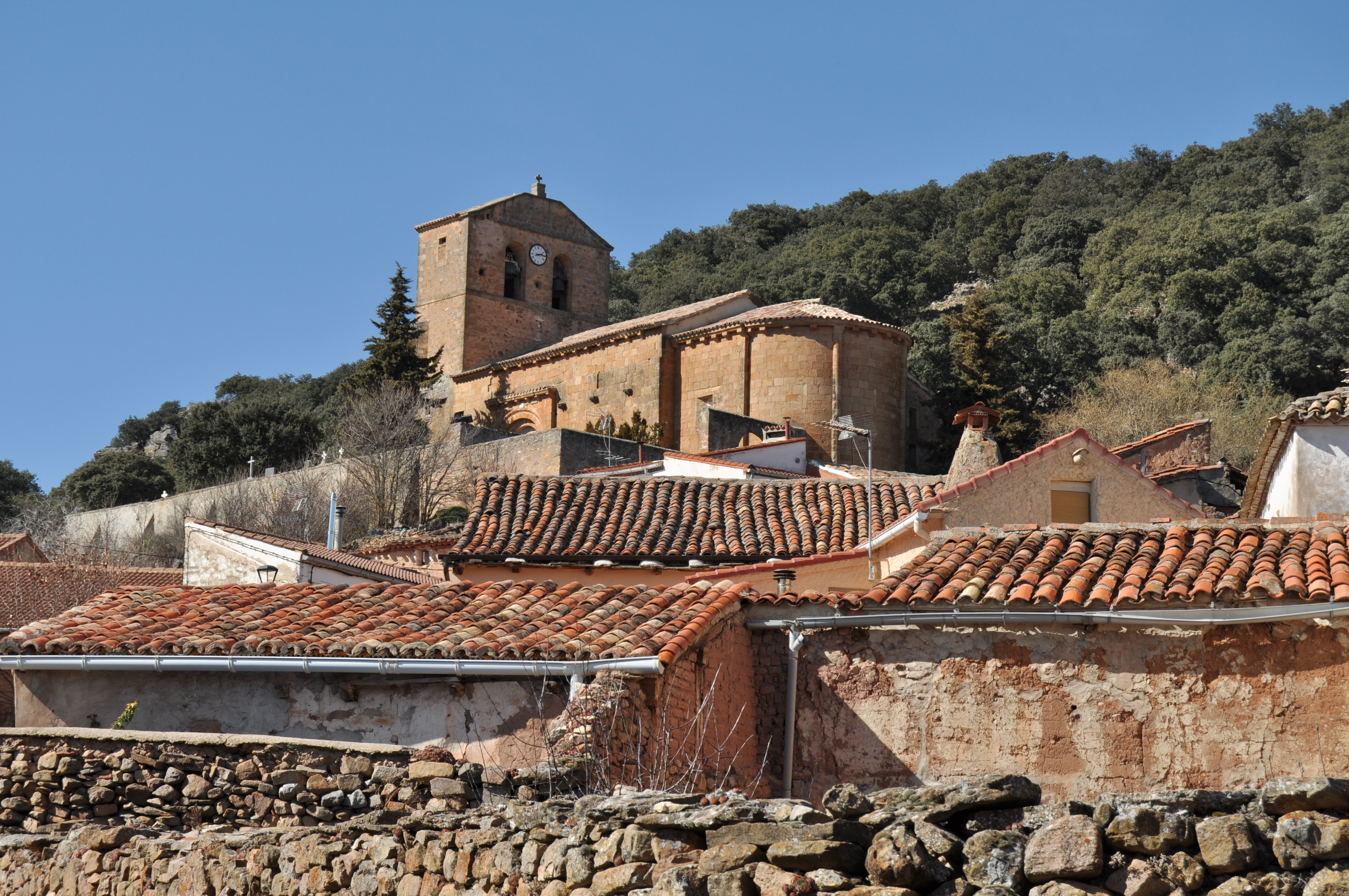 Valdegeña - 007